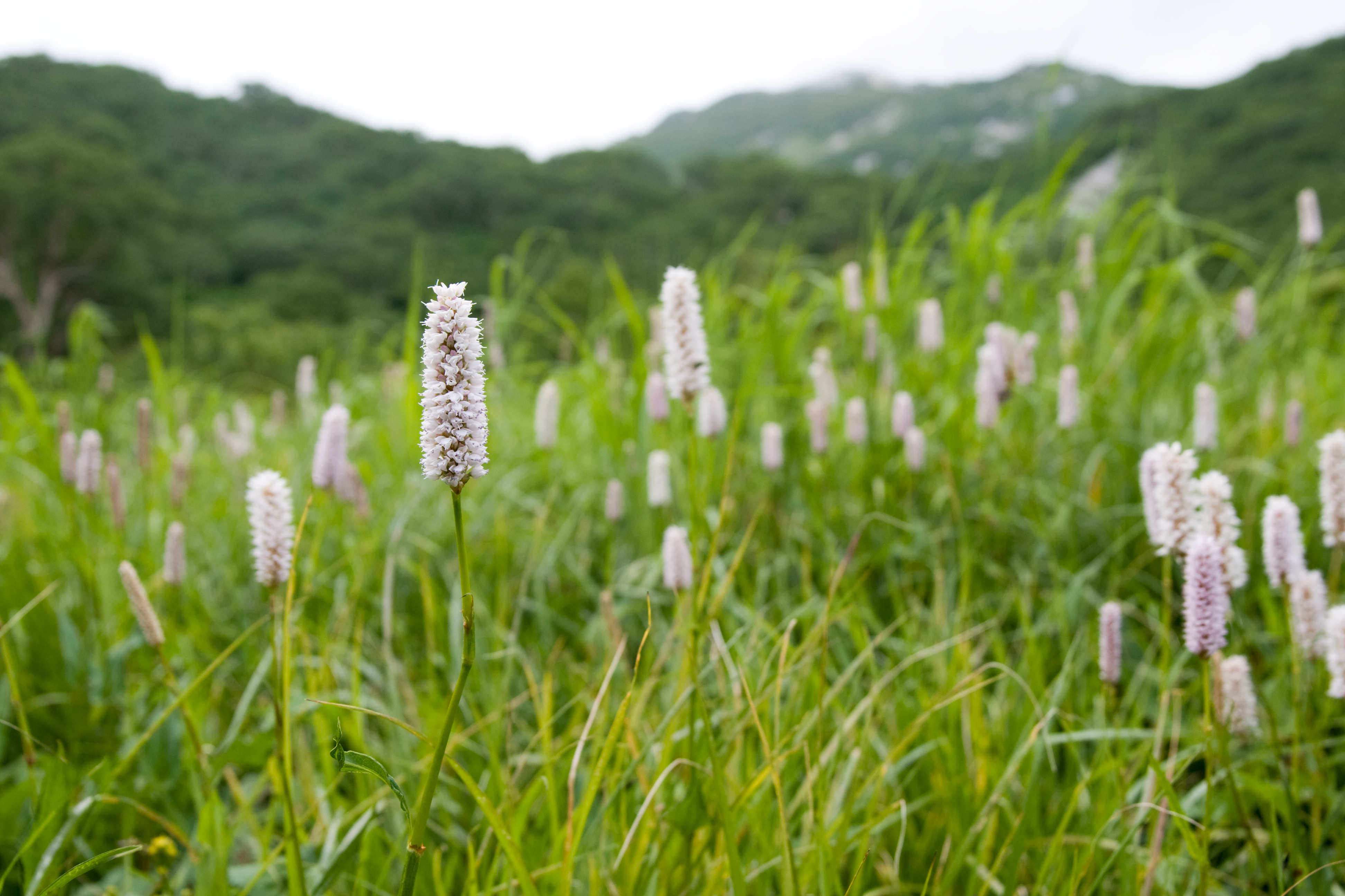 イブキトラノオ (学名:Polygonum bistorta)